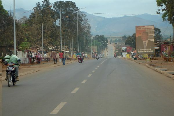 Avenue de la république, Dolisie